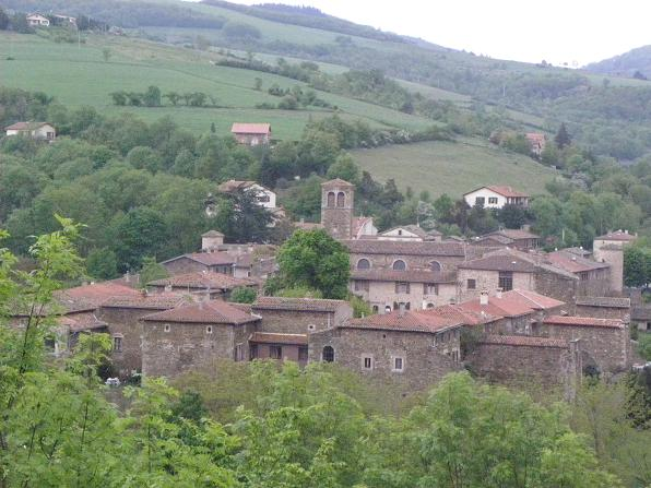 La Chartreuse de Sainte-Croix-en-Jarez